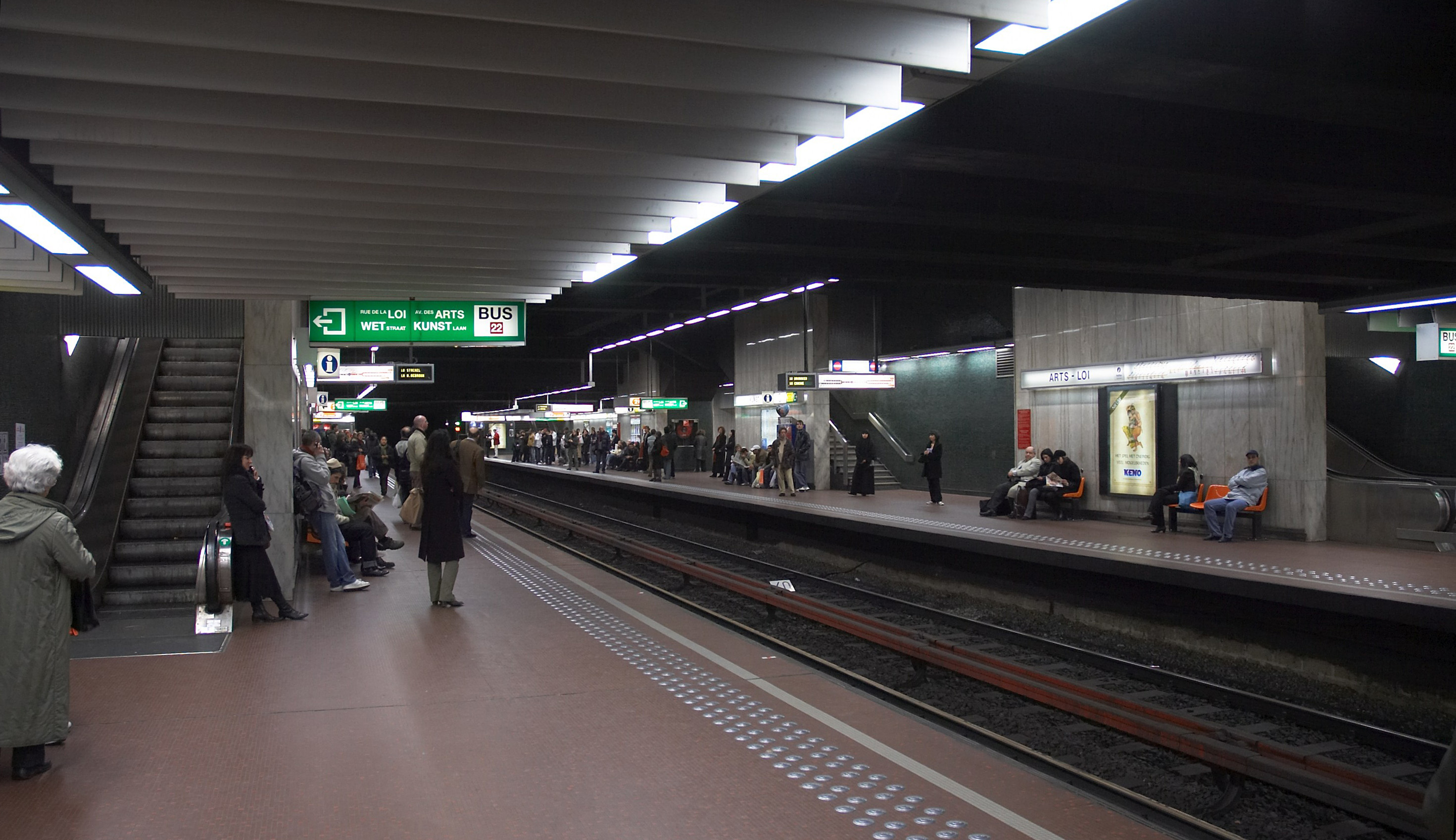 Metro station Kunstwet / Art-Loi, Brussels, Belgium. - OpenStreetMap(Info)